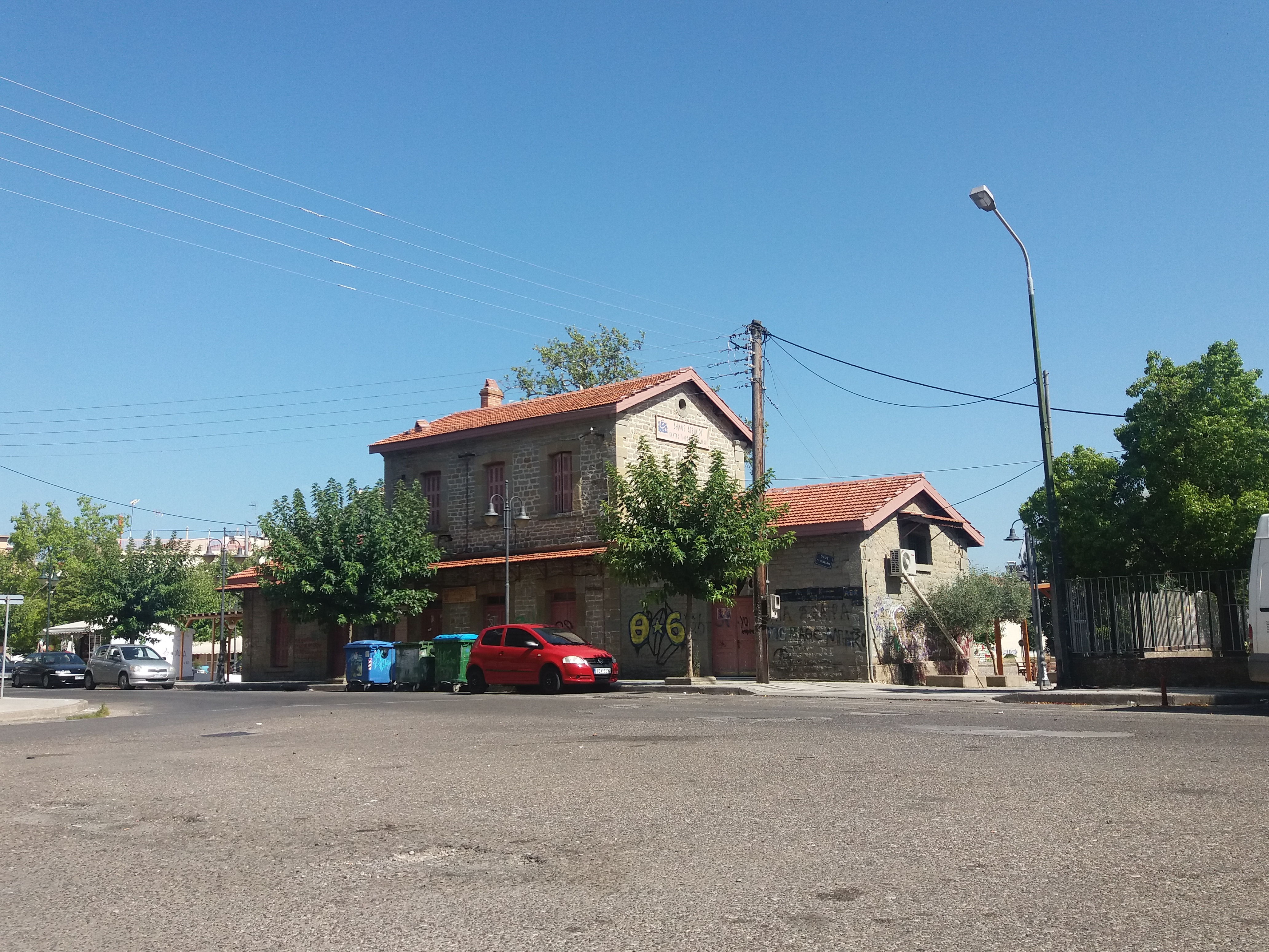 station